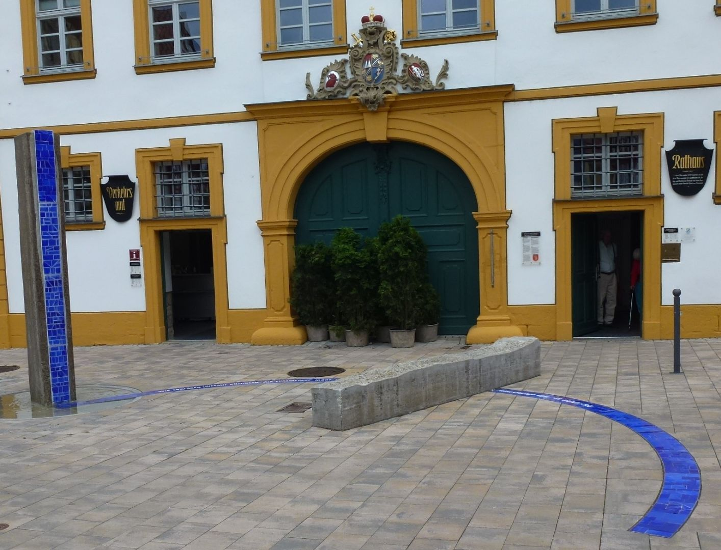 Installation zur Europastadt vor dem Rathaus Röttingen